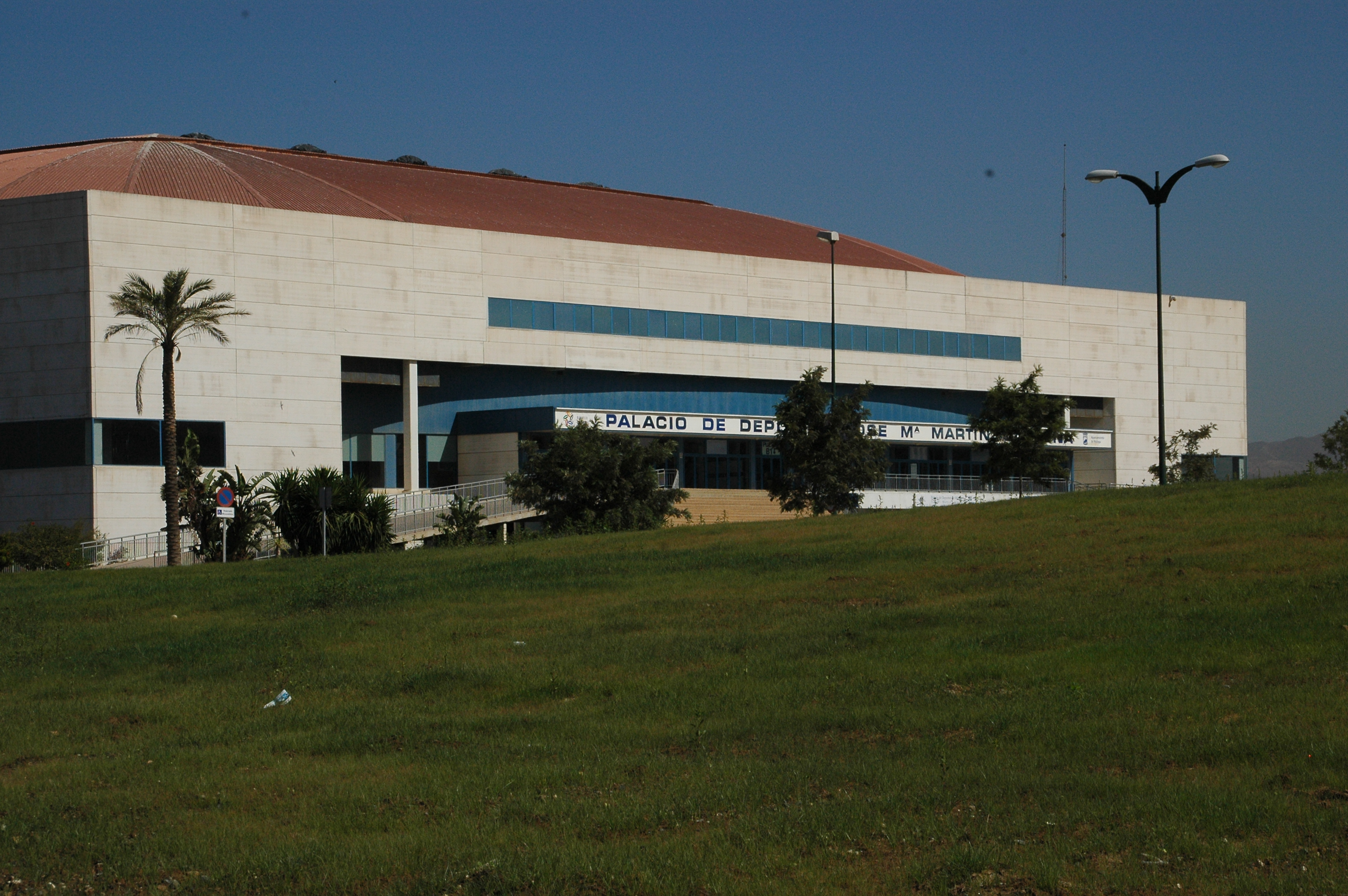 Palacio de Deportes "José Mª Martín Carpena"